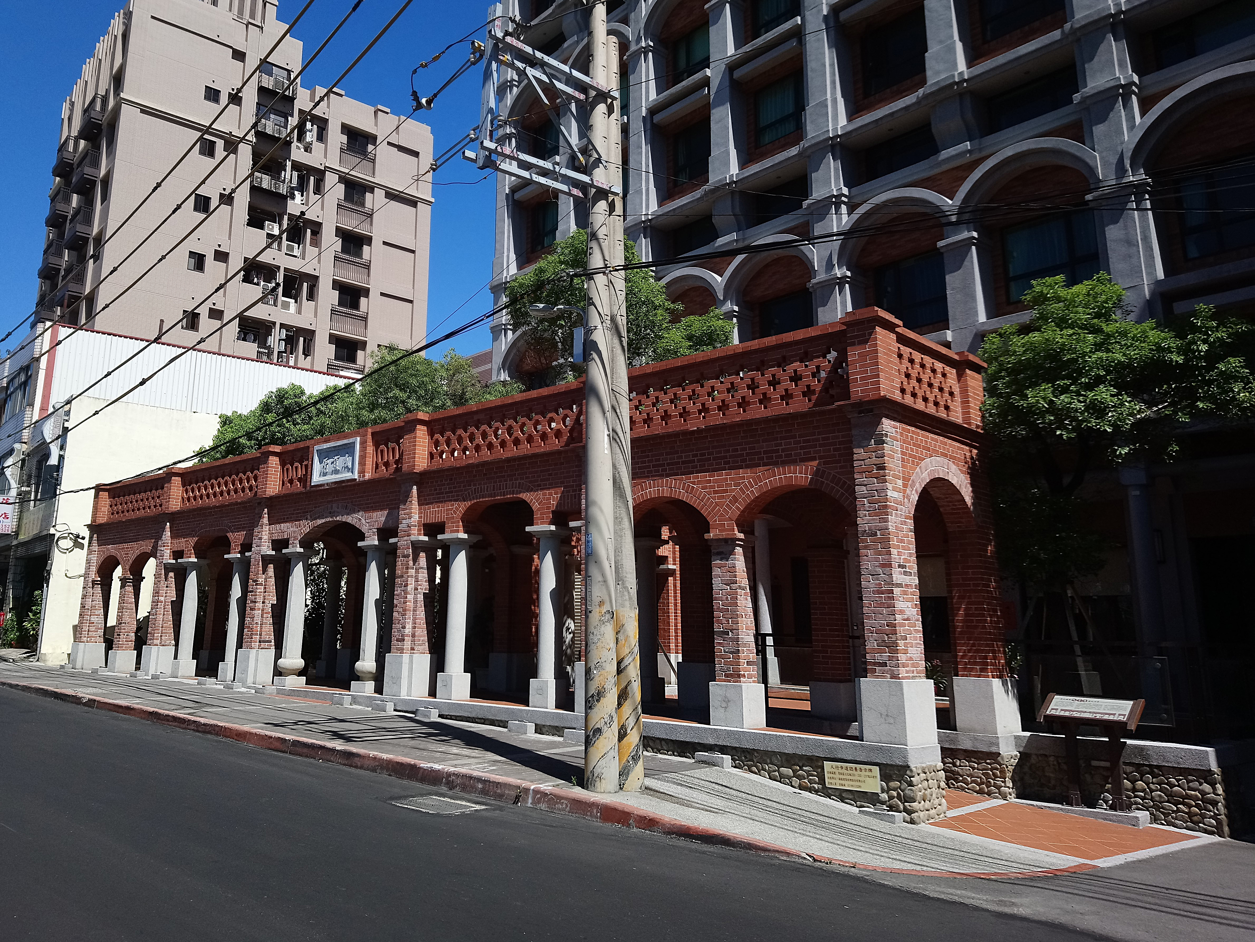 鶯歌成發居,新北市鶯歌區中部地區東鶯里